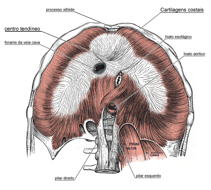 Desenho da estrutura anatômica da face inferior do diafragma, com legendas em português. This is a plate from Gray's Anatomy. Unless stated otherwise, it is from the online edition of the 20th U.S. edition of Gray's Anatomy of the Human Body, originally published in 1918.